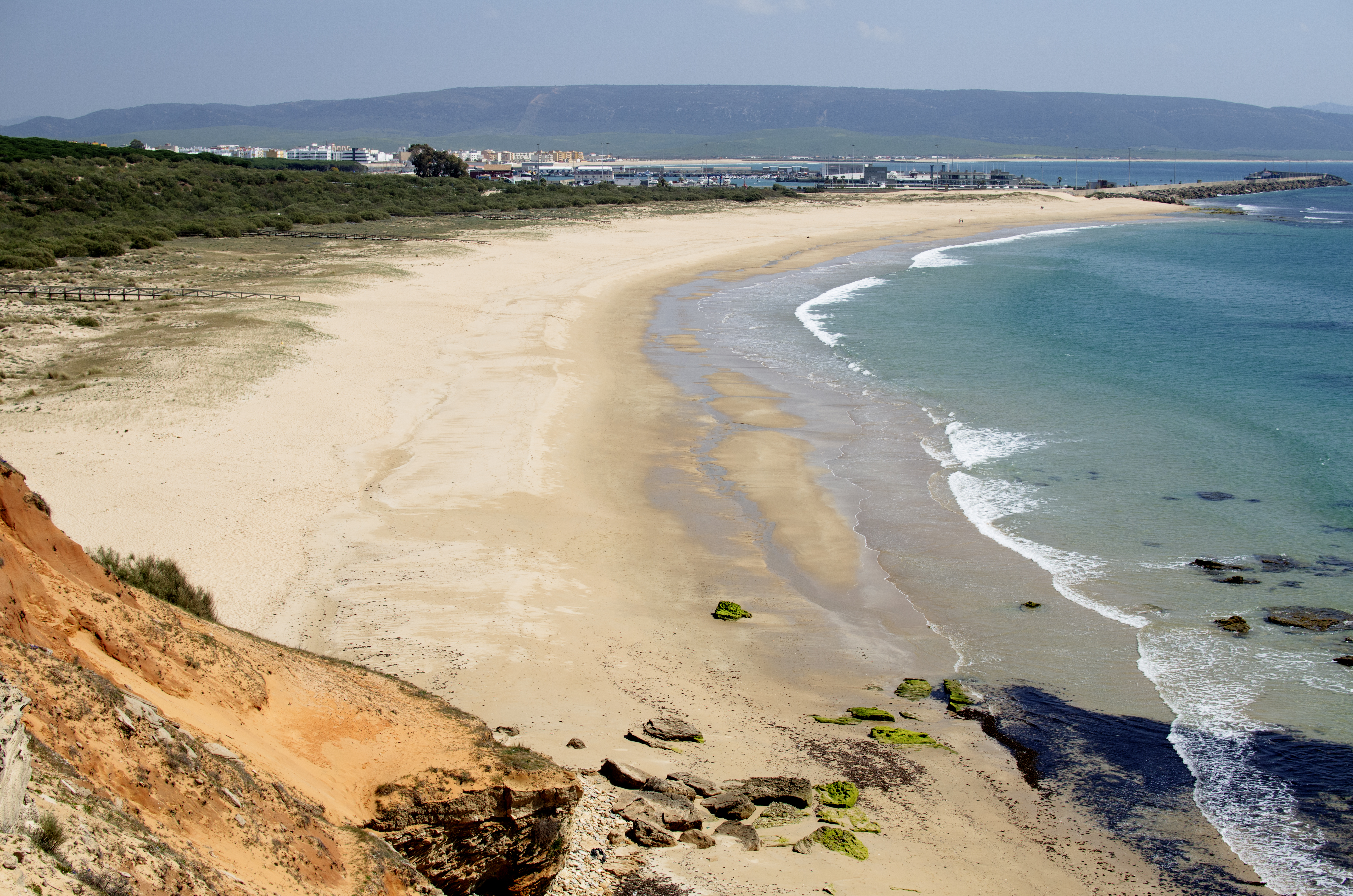 Parque natural de La Breña y Marismas del Barbate This is a photography of a Site of Community Importance in Spain with the ID: ES6120008. Natura2000 entry, EEA entry